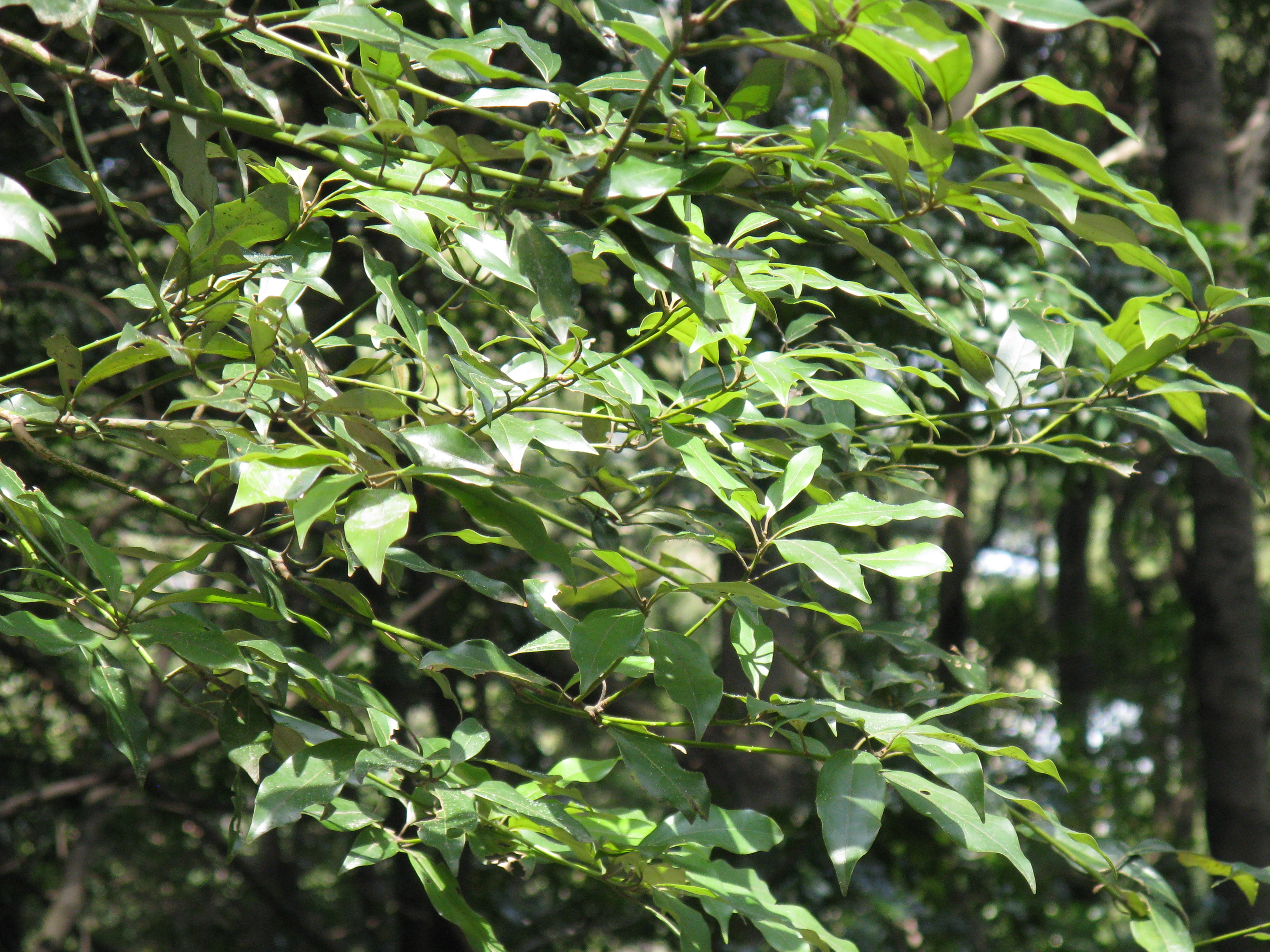 Scientific name Neolitsea aciculata